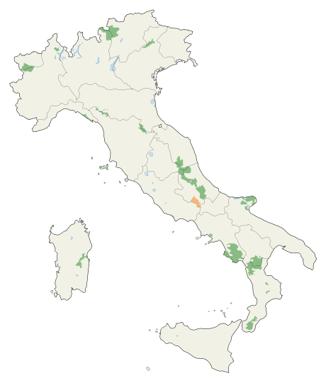 Abruzzi, Latium and Molise national park.